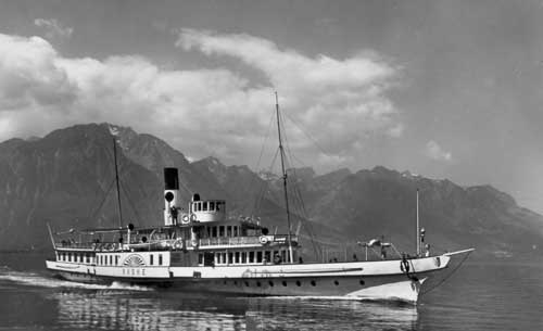 Le bateau "Rhône" en 1927